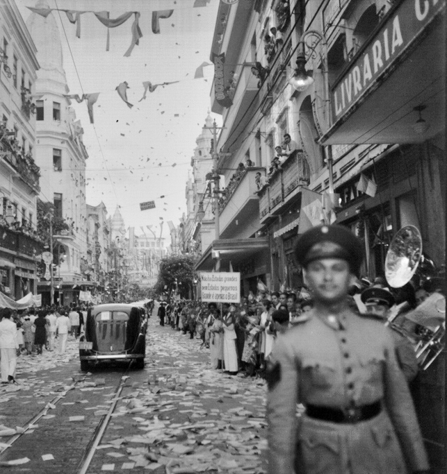 Recepção ao Presidente Getúlio Vargas em Recife - Rua Nova — Pernambuco, Brasil.